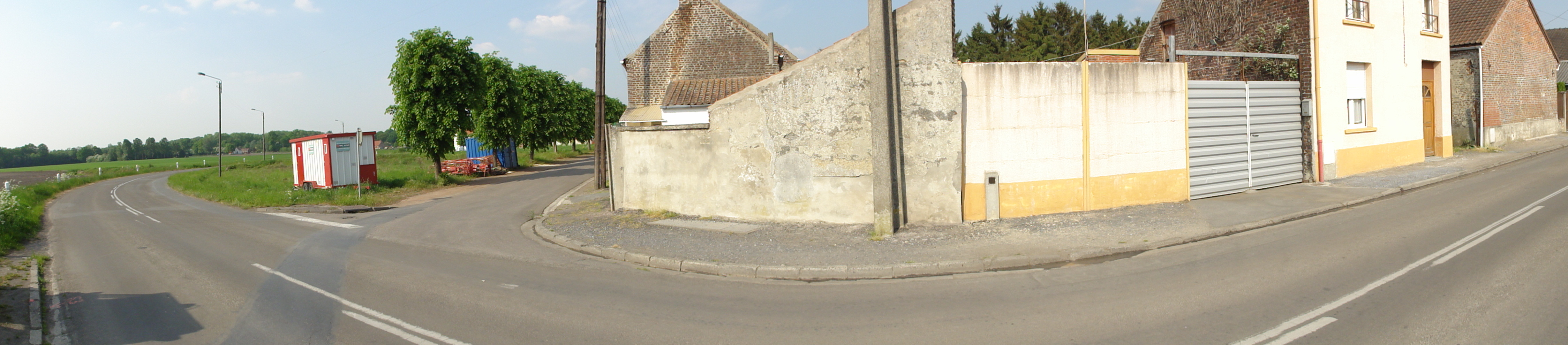 La Fosse Jeanne Colard de la Compagnie des mines d'Anzin était un charbonnage constitué de trois puits situé à Fresnes-sur-Escaut, Nord, Nord-Pas-de-Calais, France.